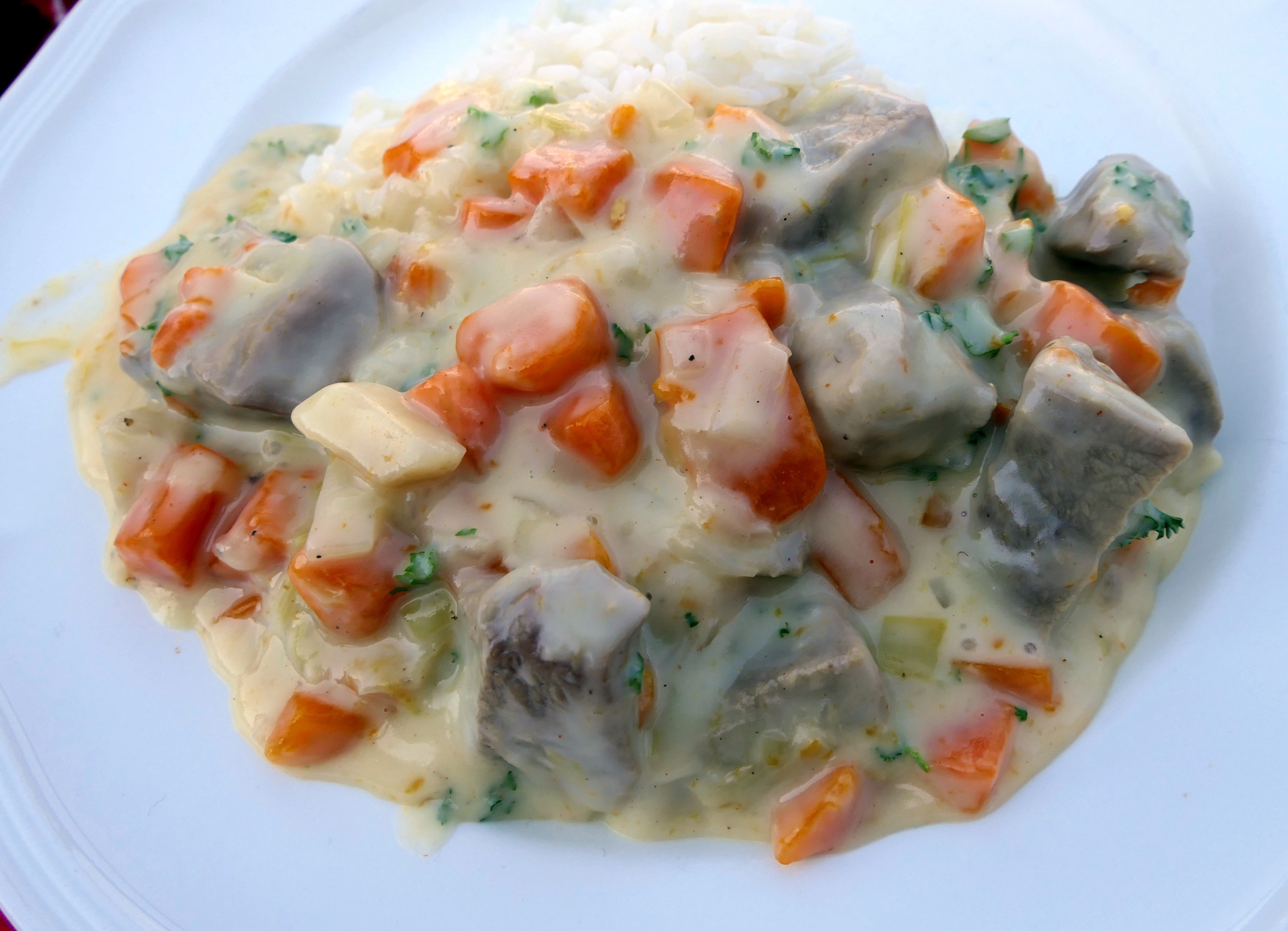 Blanquette de Veau - französisches Kalbfleischgericht